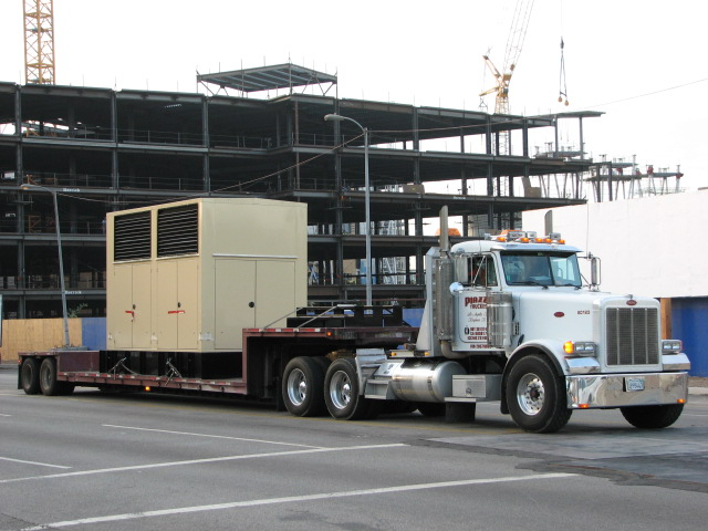 Peterbilt truck CONVENTION CENTER LOS ANGELES